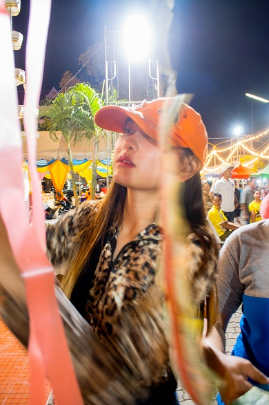 แพรวทำบุญที่วัดดอนตูมปี 2562